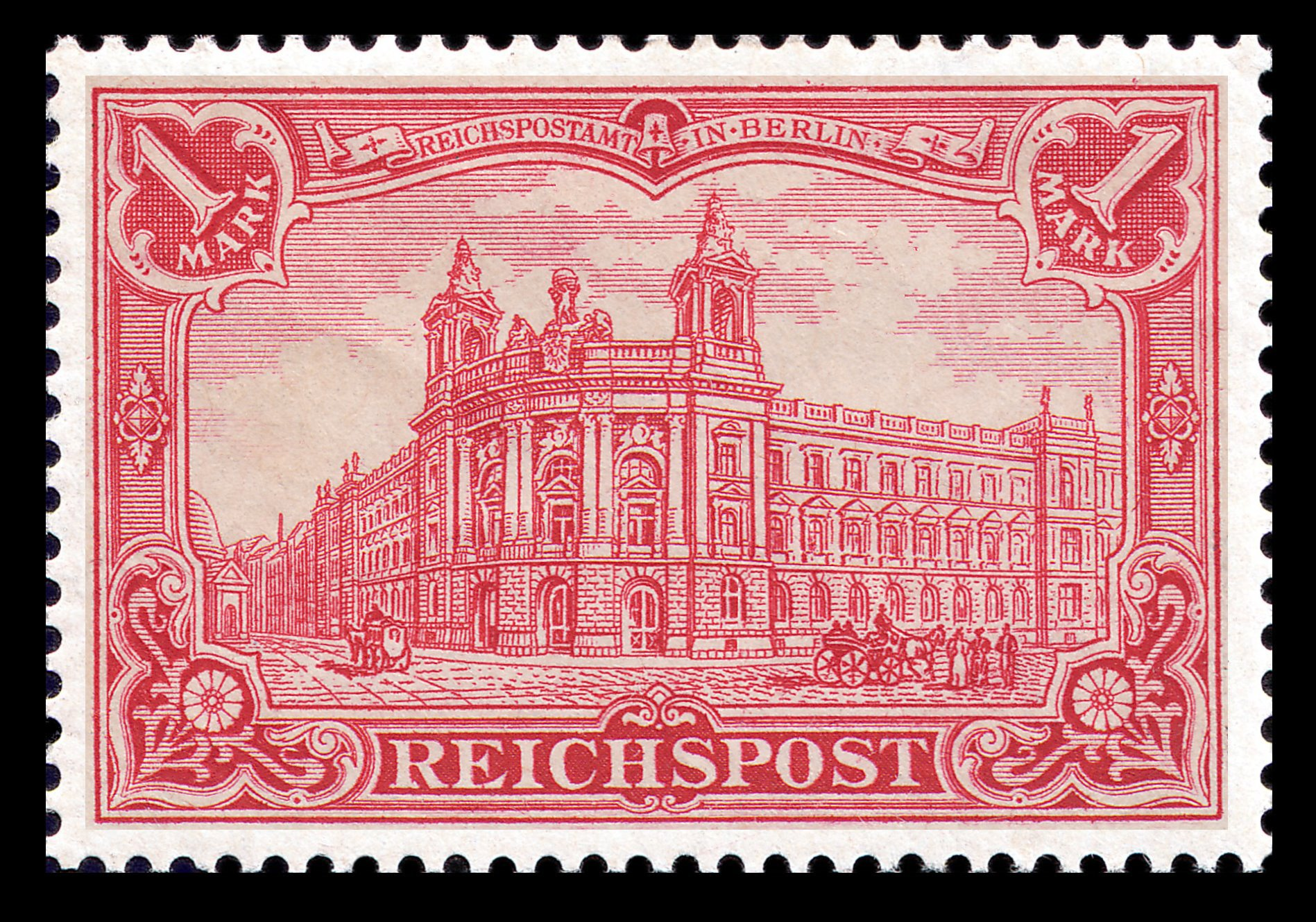 Germania 63 a postfrisch geprüft Jaeschke Lantelme